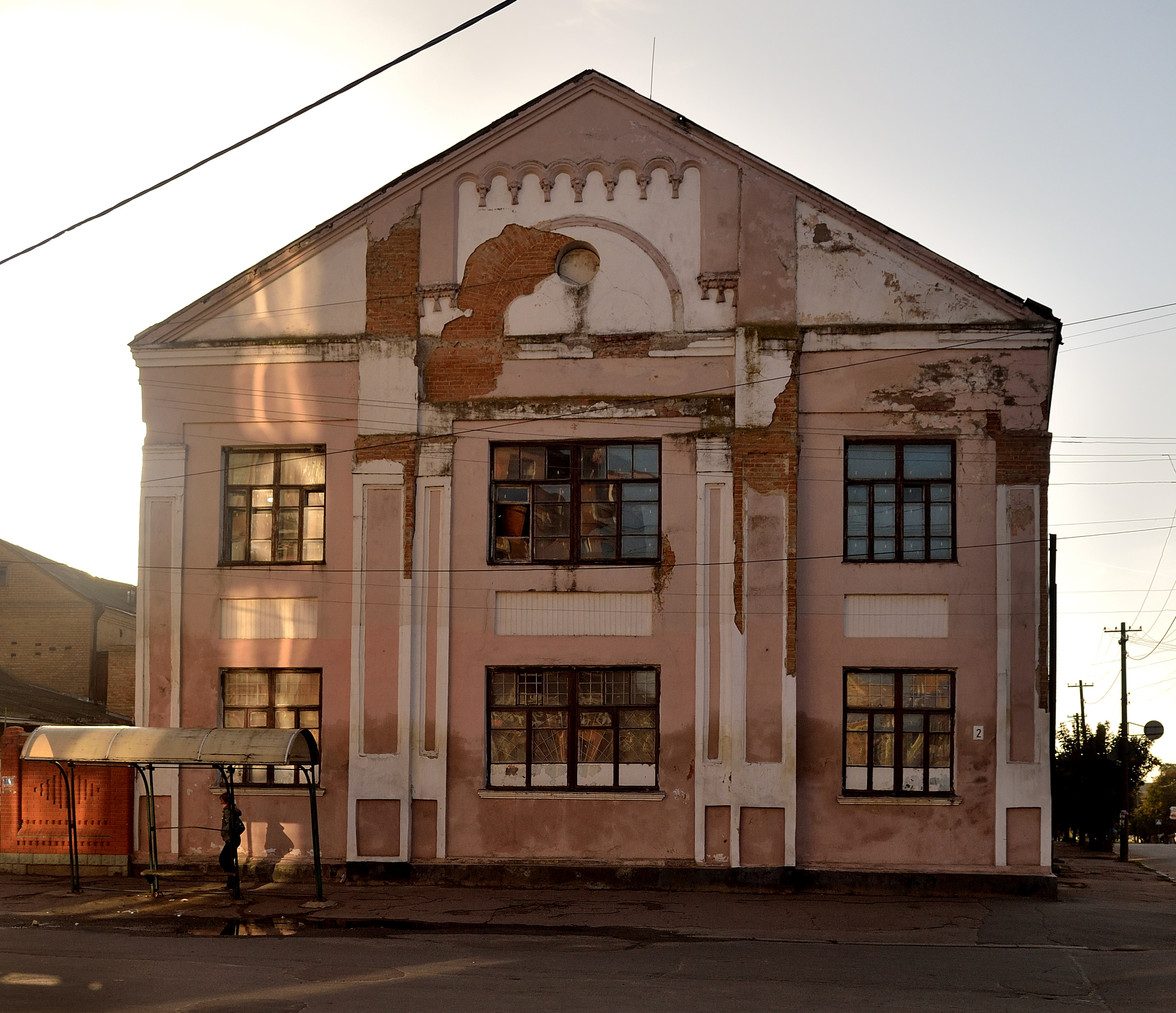 Синагога, Бердичів, вул. Вінницька, 8 (колишня вул. Свердлова, 8)